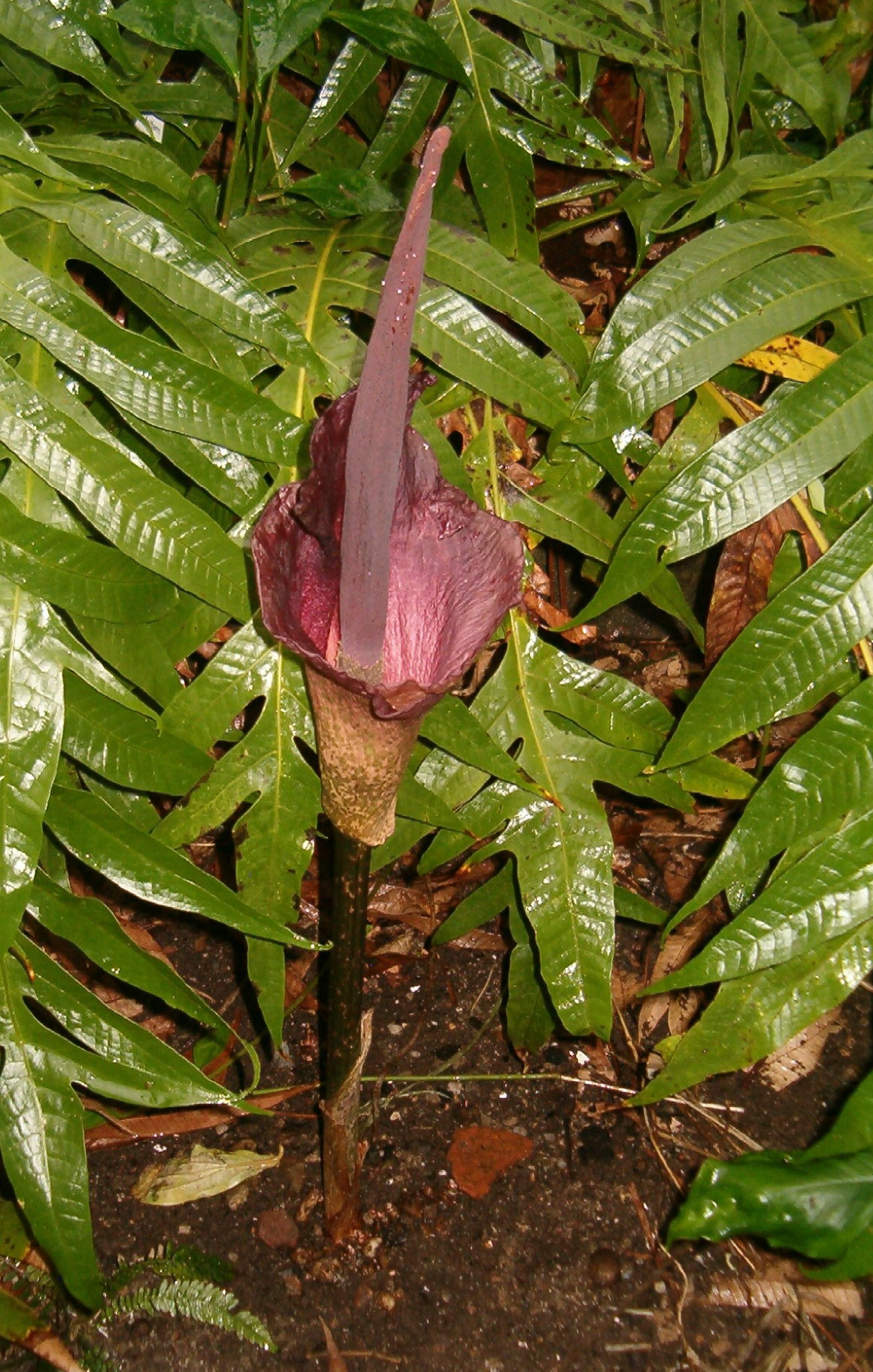 Species:Amorphophallus konjac; Genus:Amorphophallus; Familia:Category:Araceae Inflorescence; Botanischer Garten Dresden